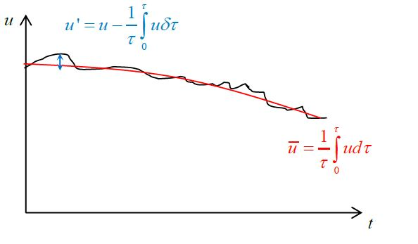 מהירות ממוצעת עבור זרימה טורבולנטית